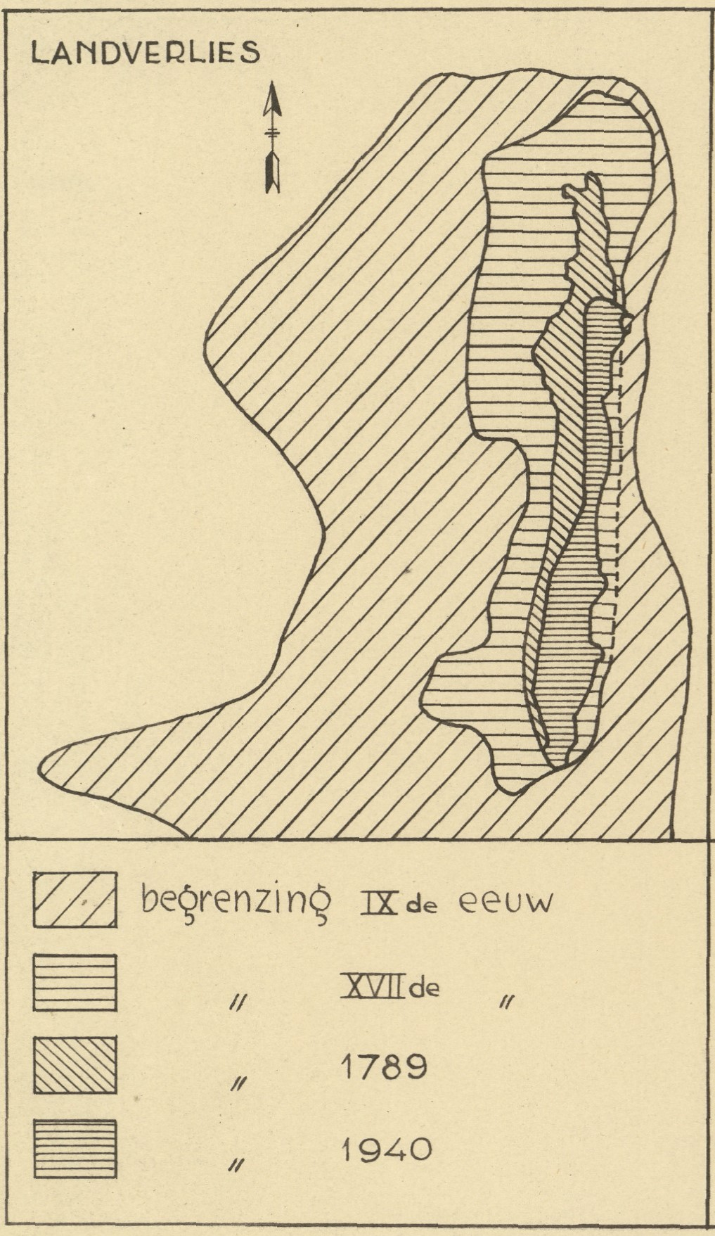 landverlies-bewoningssporen-dijkjes (opmerking: Techniek: lichtdruk) Objectnummer: [MA]T-117397